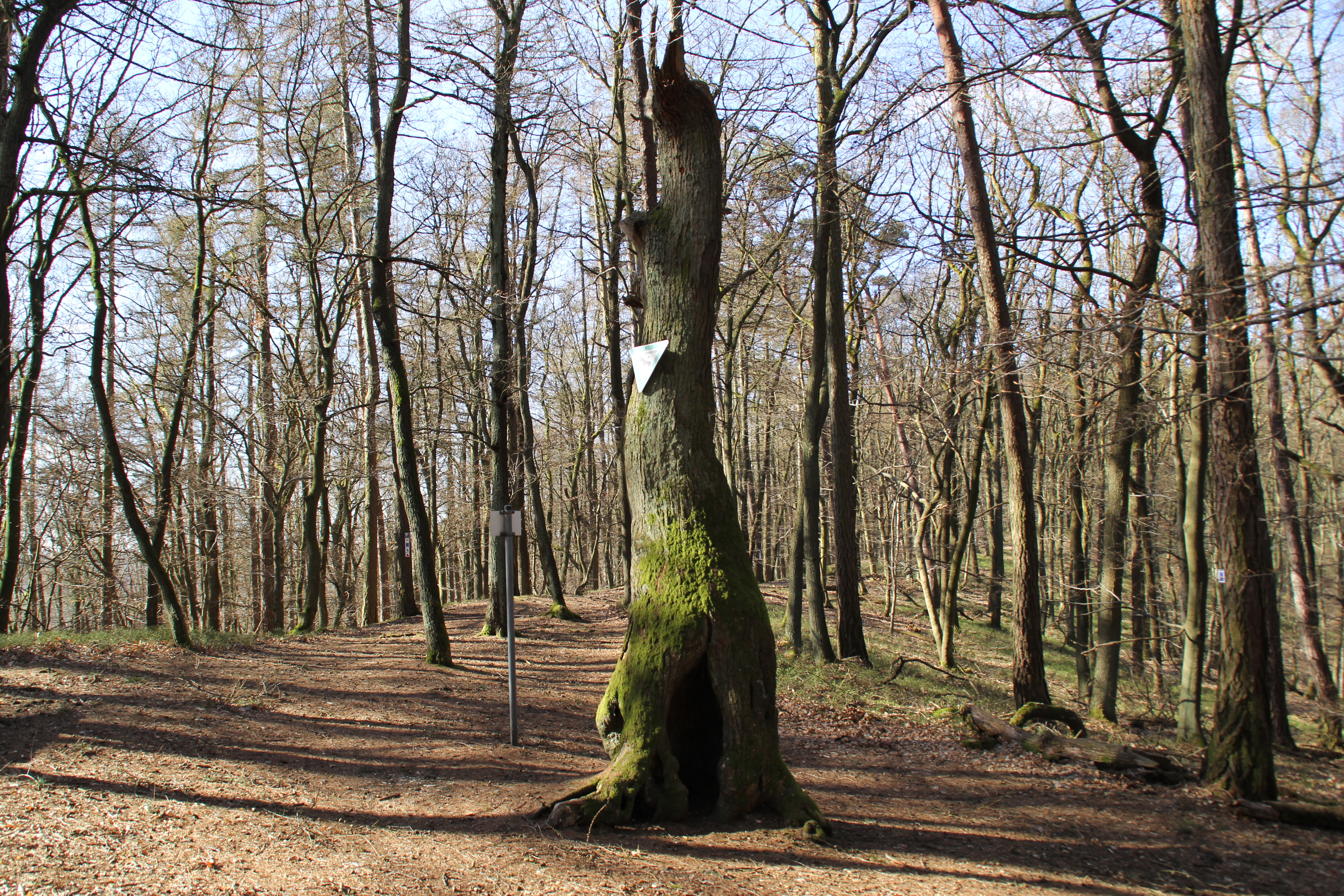 Das Naturdenkmal Bildeiche am Gipfelweg des Hahnenkamms im Spessart bei Alzenau, Bayern